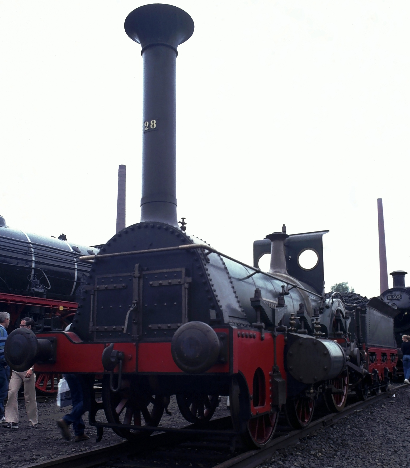 Dampflokomotive Pfalz in Bochum-Dahlhausen. Nachbau von 1925.